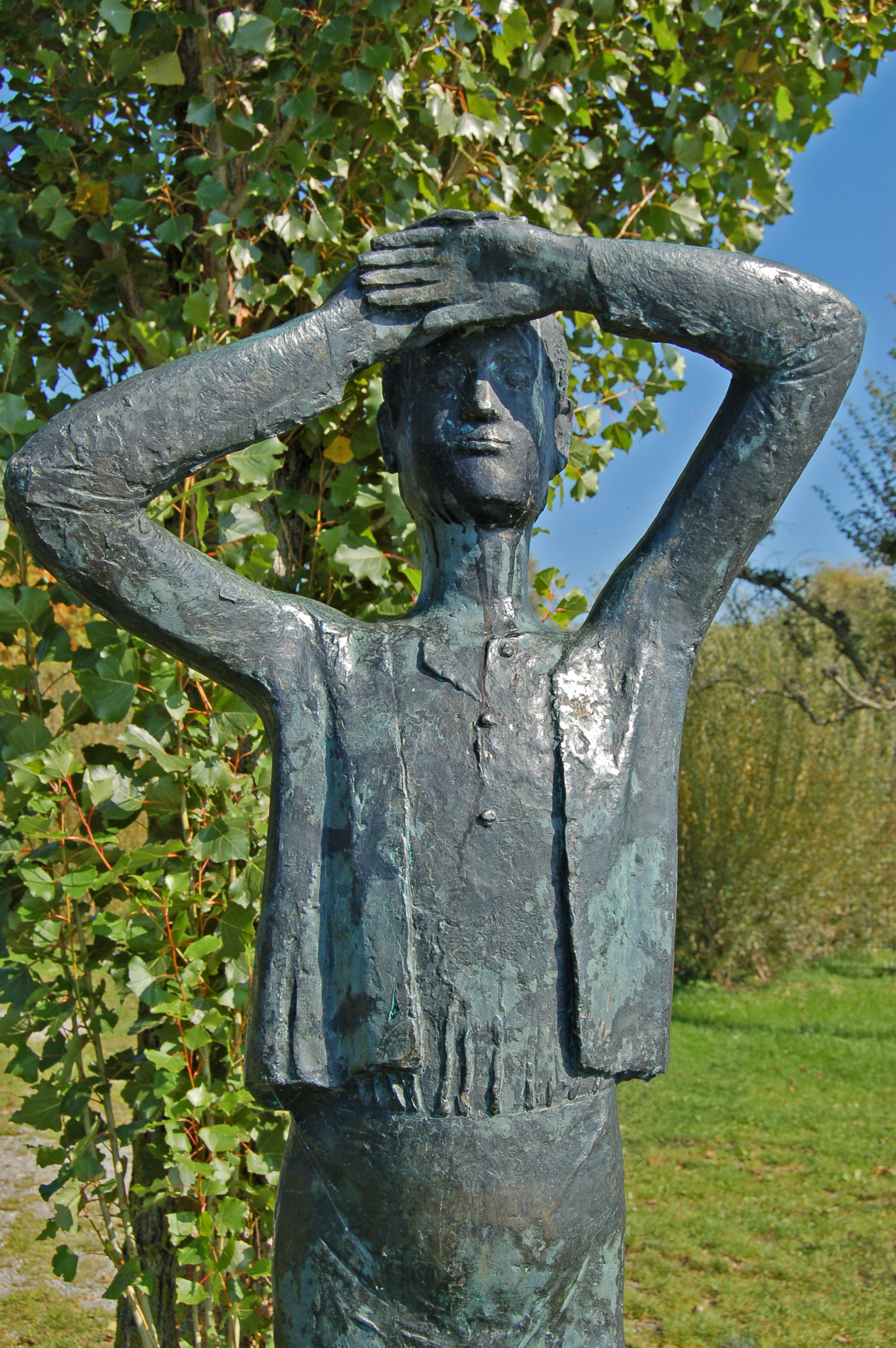 »Der liebe Augustin« ist eine Romanfigur aus dem Jahr 1921 des Autos Horst-Wolfram Geißler, die dieser in Wasserburg leben ließ. Als Dank für diese bekannte Romanfigur wurde Geißler Ehrenbürger Wasserburgs. Geißler, der 1983 in München starb, fand auf eigenen Wunsch seine letzte Ruhe auf dem Wasserburger Friedhof neben der Pfarrkirche St. Georg. Viele Restaurants und Hotels hier im Ort haben den Namen »Augustin« in ihrer Bezeichnung. Die Plastik selber steht etwas außerhalb des Ortes direkt am Seeufer und blickt in Richtung Halbinsel.